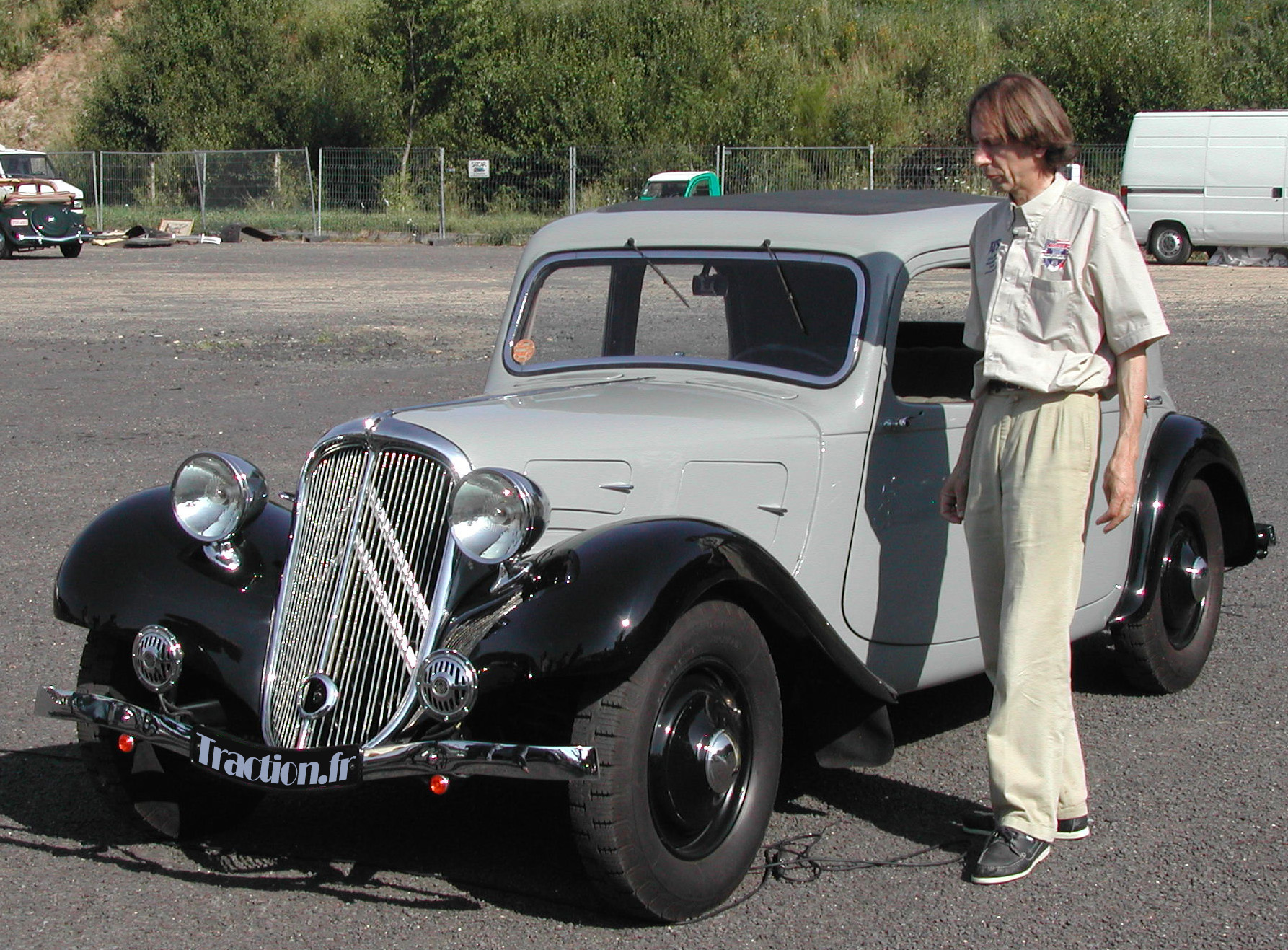 Les Tractionades en 2003, une des plus ancienne traction du monde appartenant Pietro Turchi, le modèle 7A de 1934. A côté, l'historien Olivier de Serres